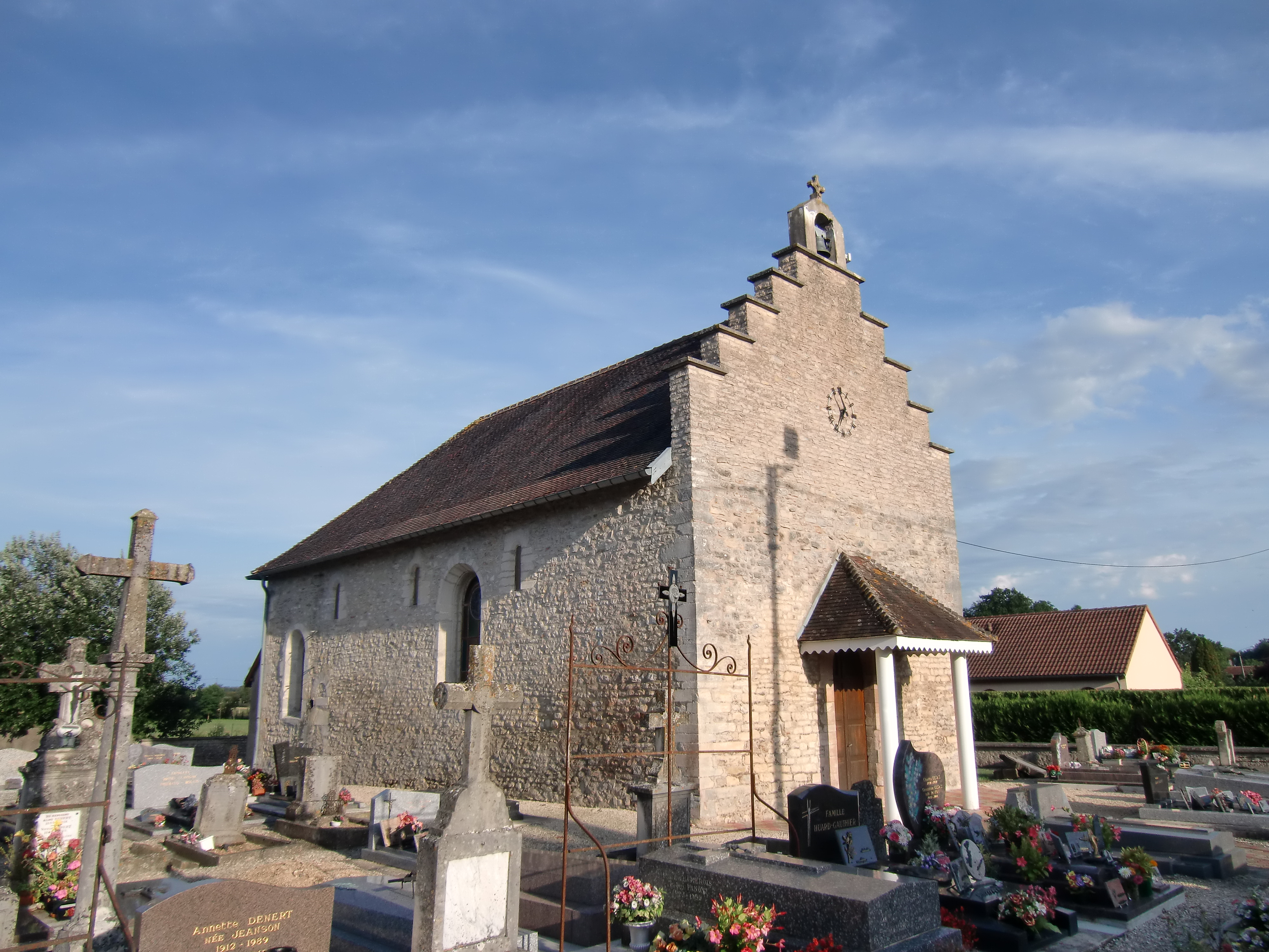 église de Crespy-le-Neuf (Aube, France)